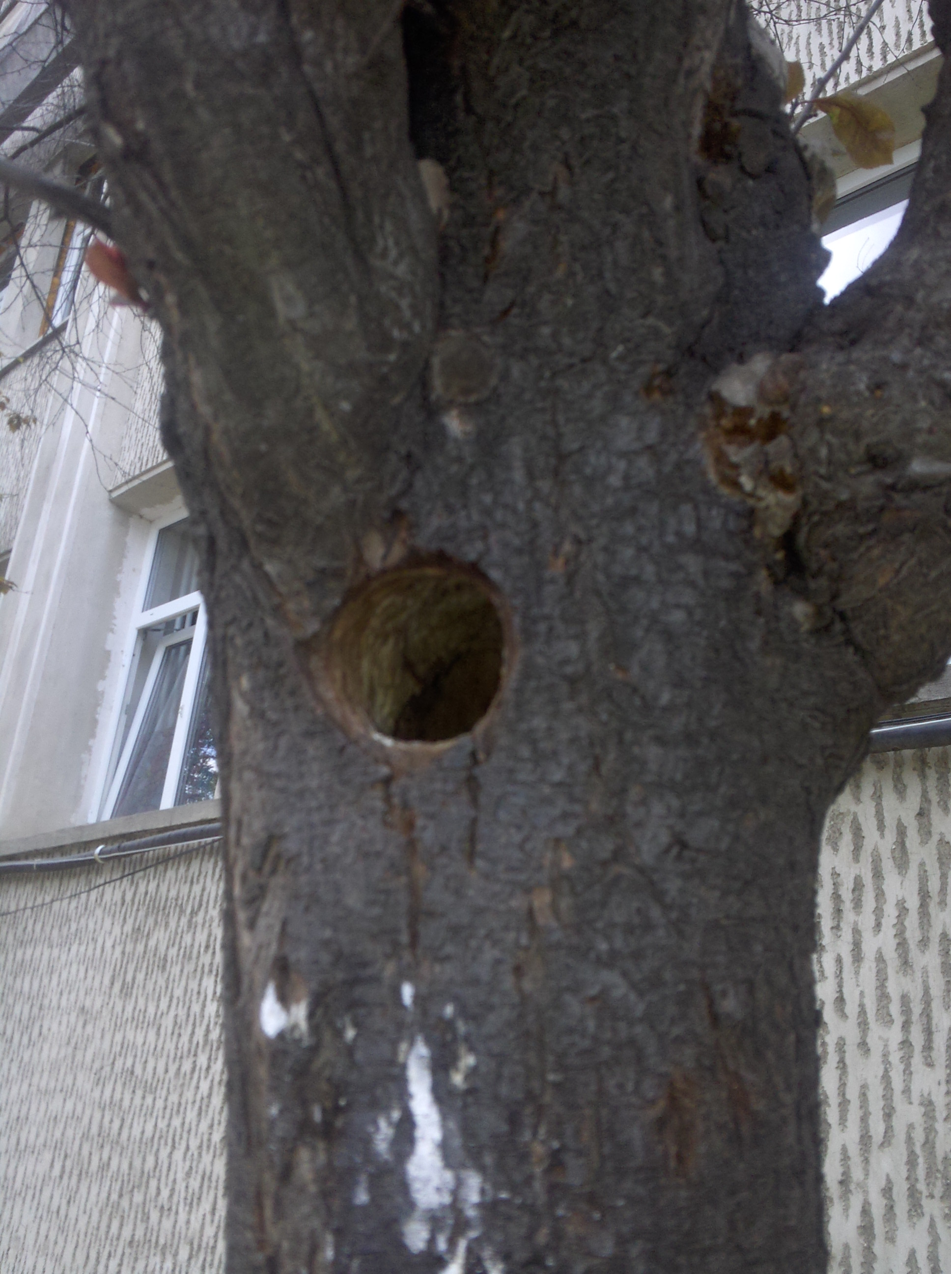 scorbura unei ciocănitori, Roman, Neamţ